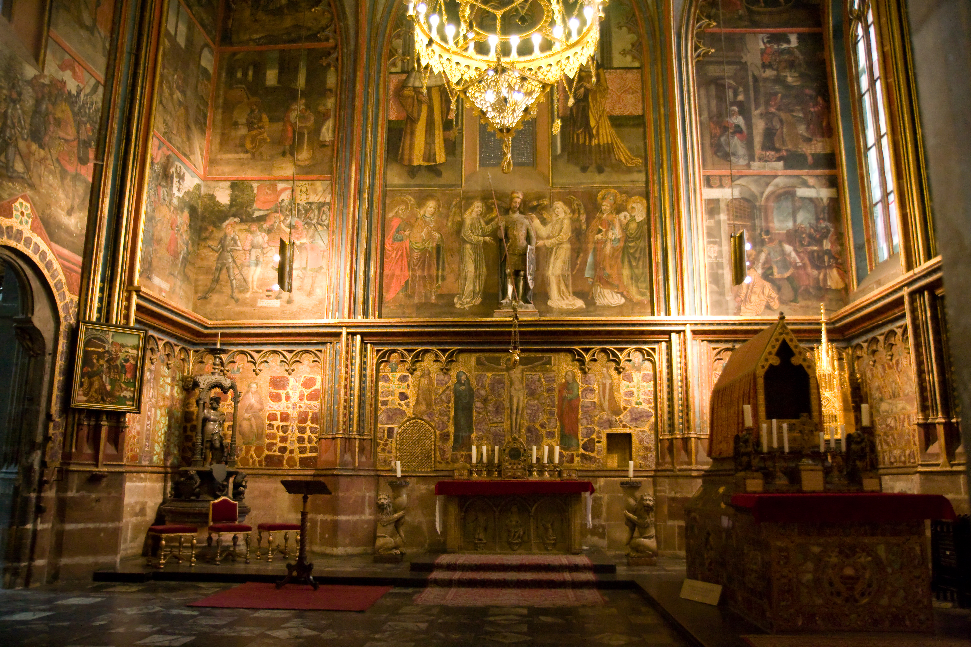 Praha, Katedrála svatého Víta, Václava a Vojtěcha, Svatováclavská kaple